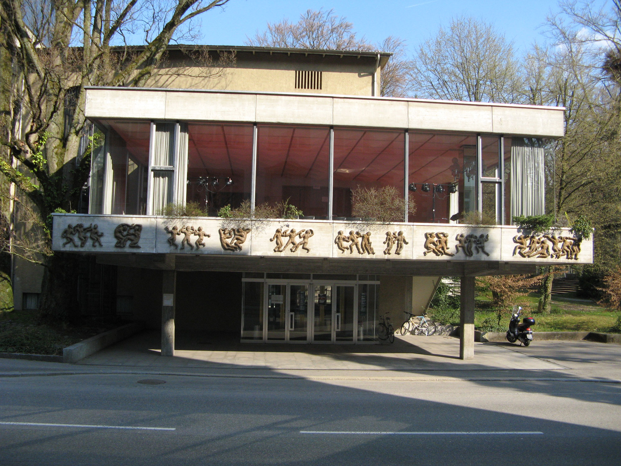 Stadttheater Baden